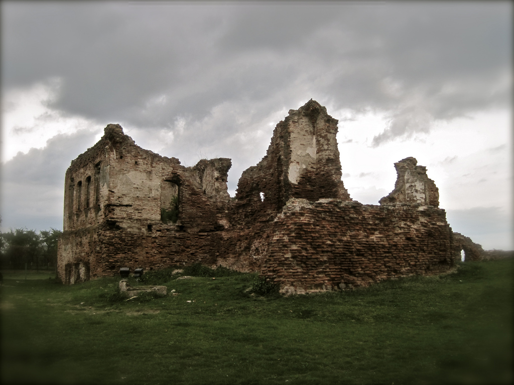 Ruinele Palatului postelnicului Constantin Cantacuzino din Filipestii de Targ (Prahova - Romania)